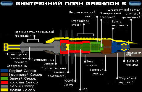 внутренняя карта станции Вавилон-5схематическое изображение вымышленного космического аппарата, сериал Вавилон-5